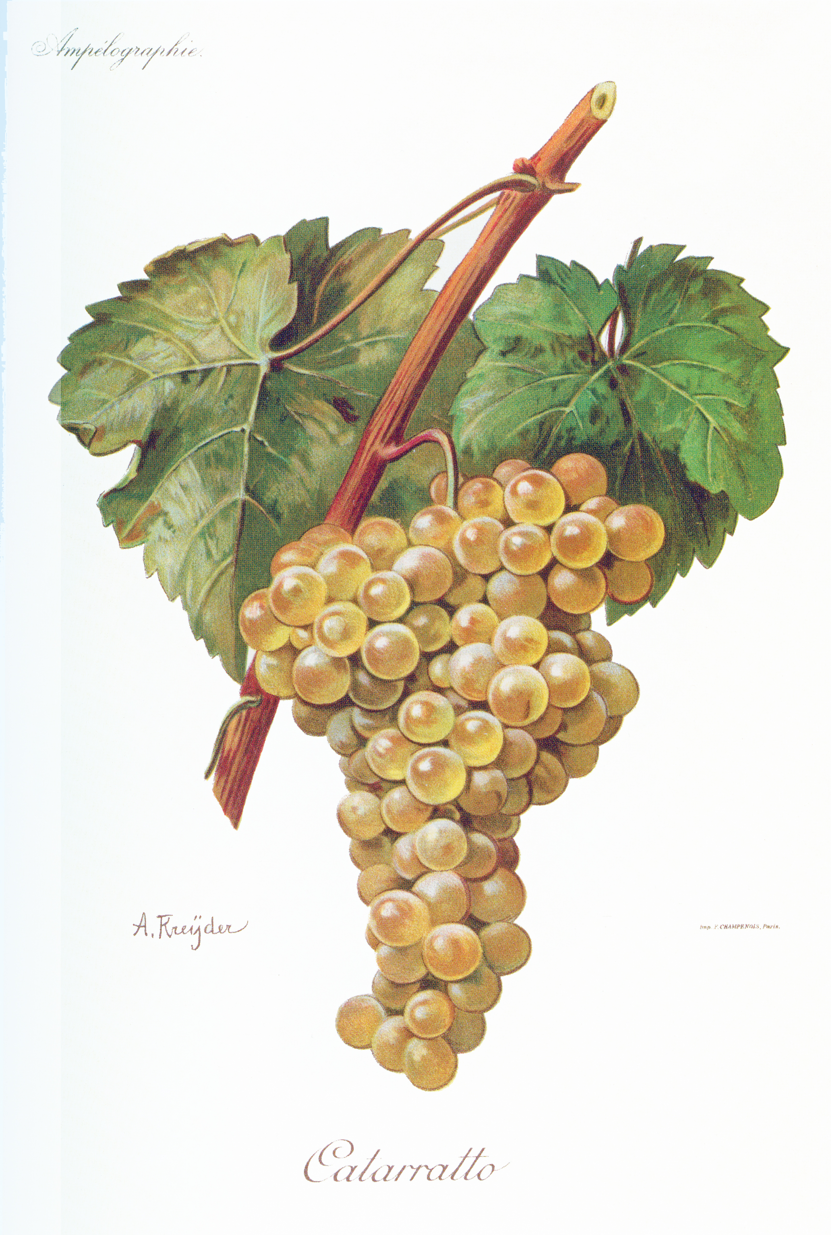 Catarratto bianco w L'Ampélographie Viali i Vermorela (1901-1910)